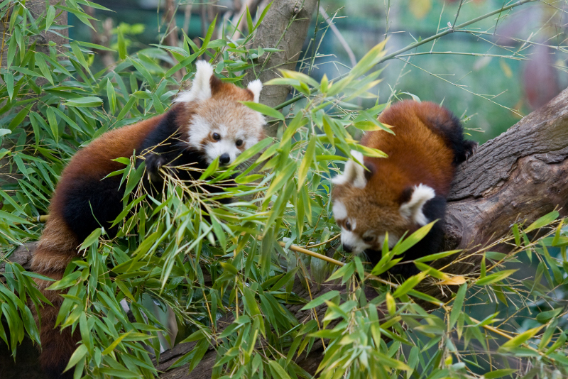 Crvene pande (Aulurus fulgens) u zagrebačkom zoološkom vrtu u studenome 2010. godine.